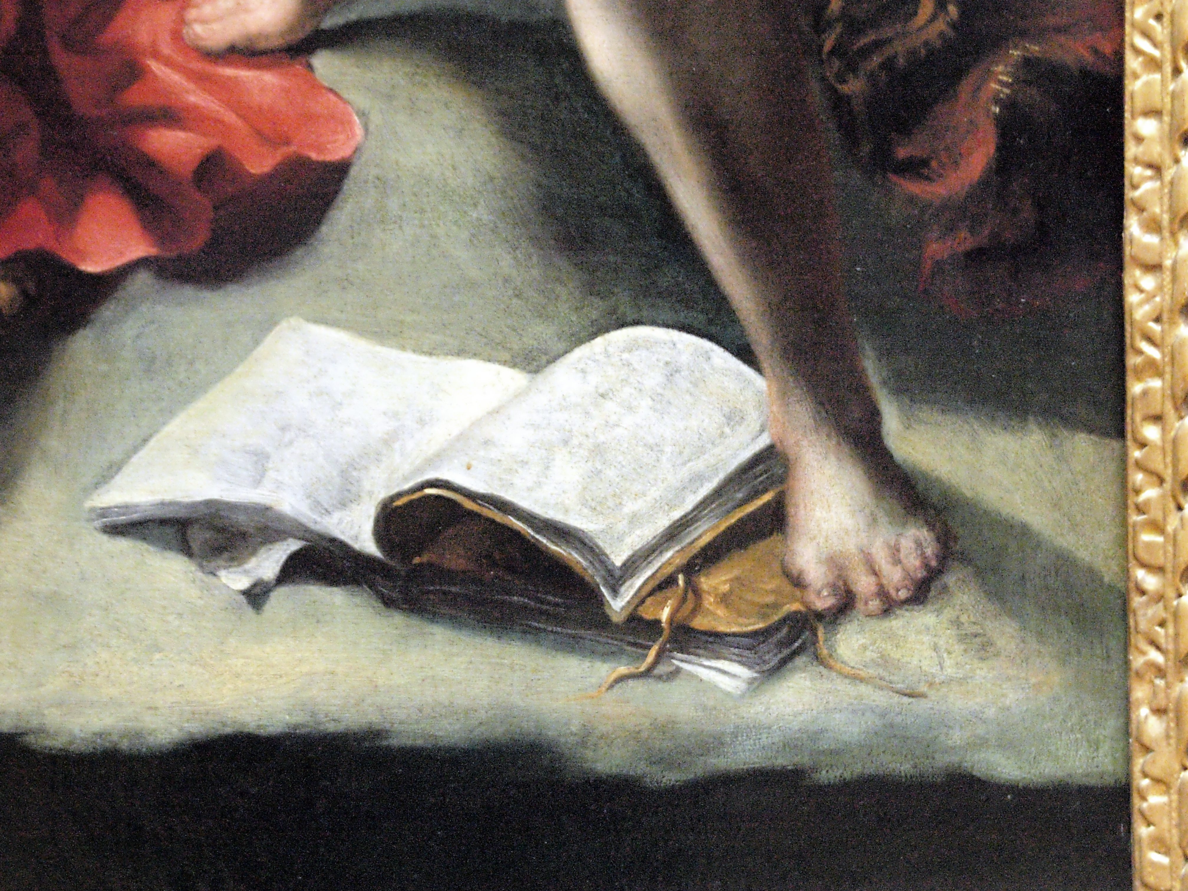 Orazio Borgianni. La Vision de Saint Jerome (Rome, 1578-1616). Louvre RF 1983-50.